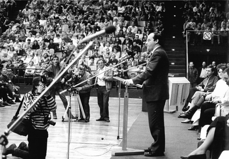 ADN-ZB Pätzold 15.2.90 Schwerin: Wahlkampf Gregor Gysi, Vorsitzender der PDS, sprach vor über 6000 Bürgern in der Sport- und Kongreßhalle der mecklenburgischen Bezirksstadt.